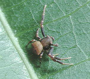 male Thomisus kitamurai from Okinawa.